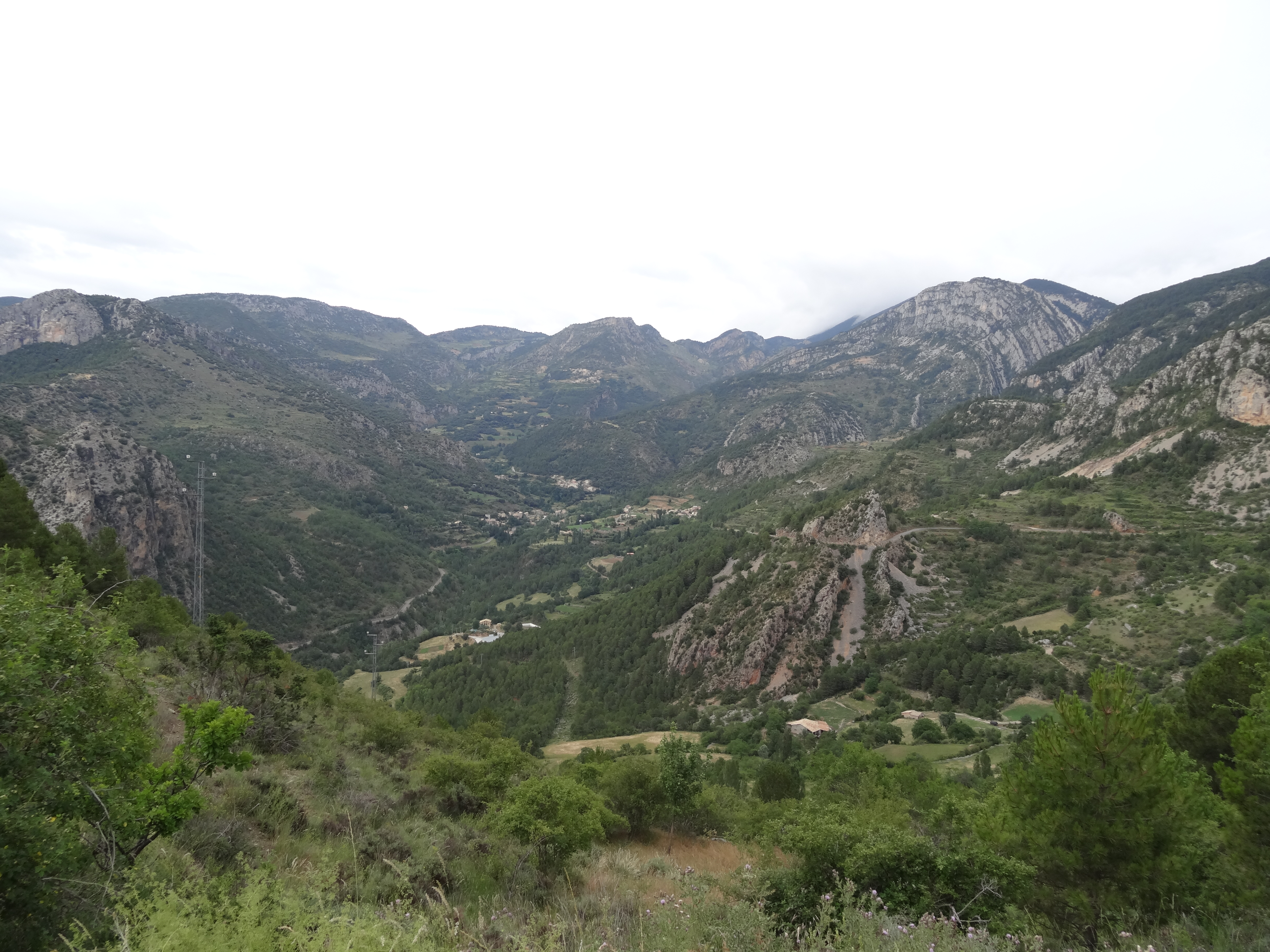 Fígols i Alinyà